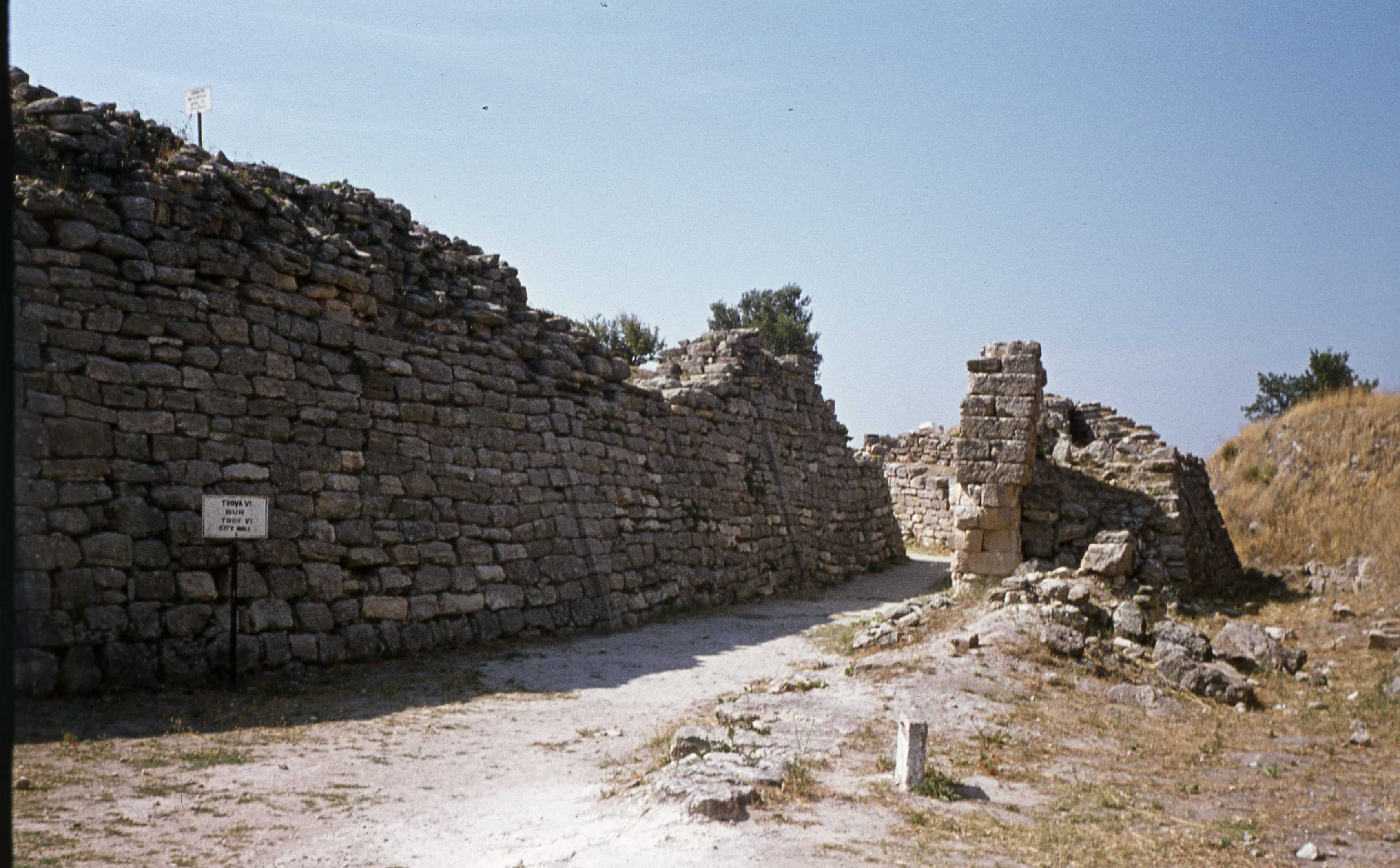 Troja Hissarlik Türkei Troy Hisarlik TurkyTroja03